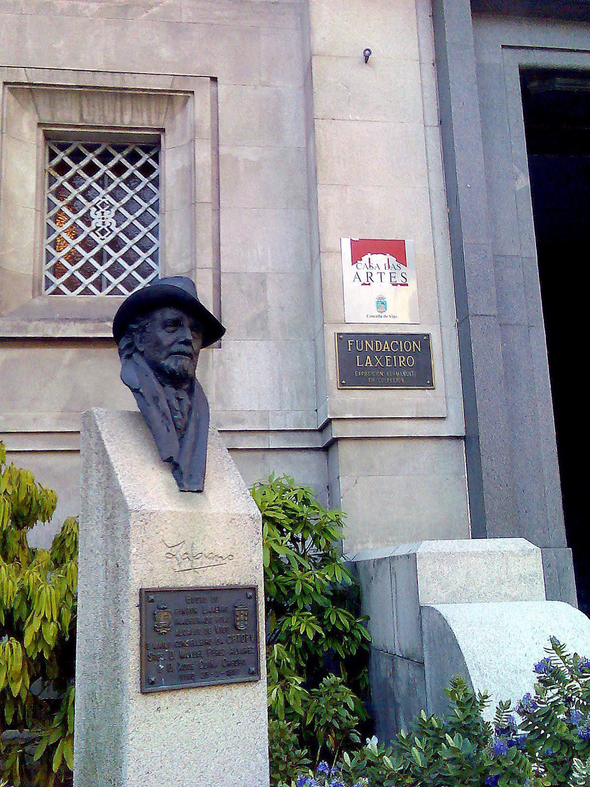 Monumento a Laxeiro na entrada da Fundación Laxeiro en Vigo